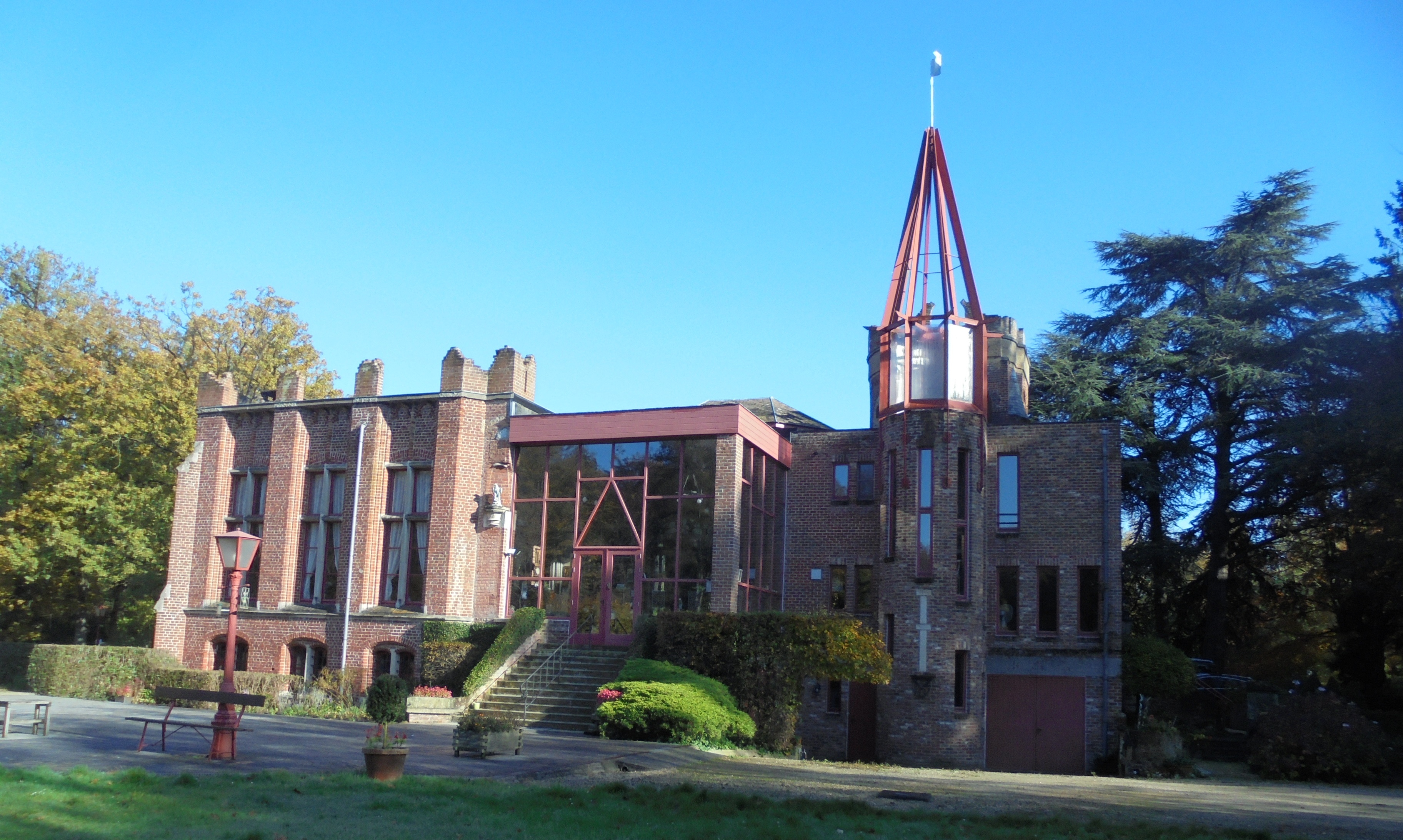 Kasteel Lakenbossen of Rood Kasteel - Lakebossendreef - Ruddervoorde - Oostkamp - West-Vlaanderen - België